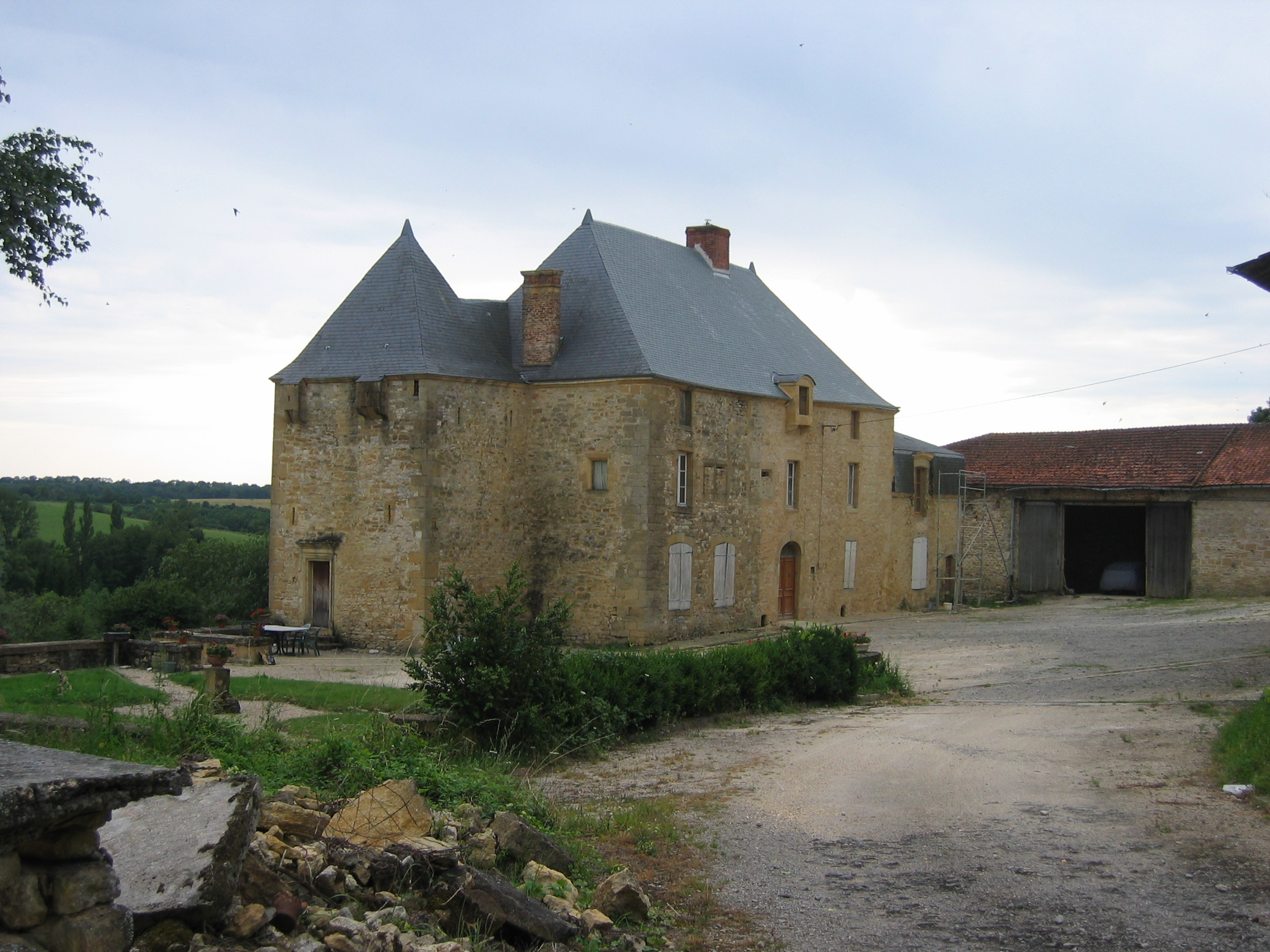 Château de Saint-Pierremont en Ardennes France